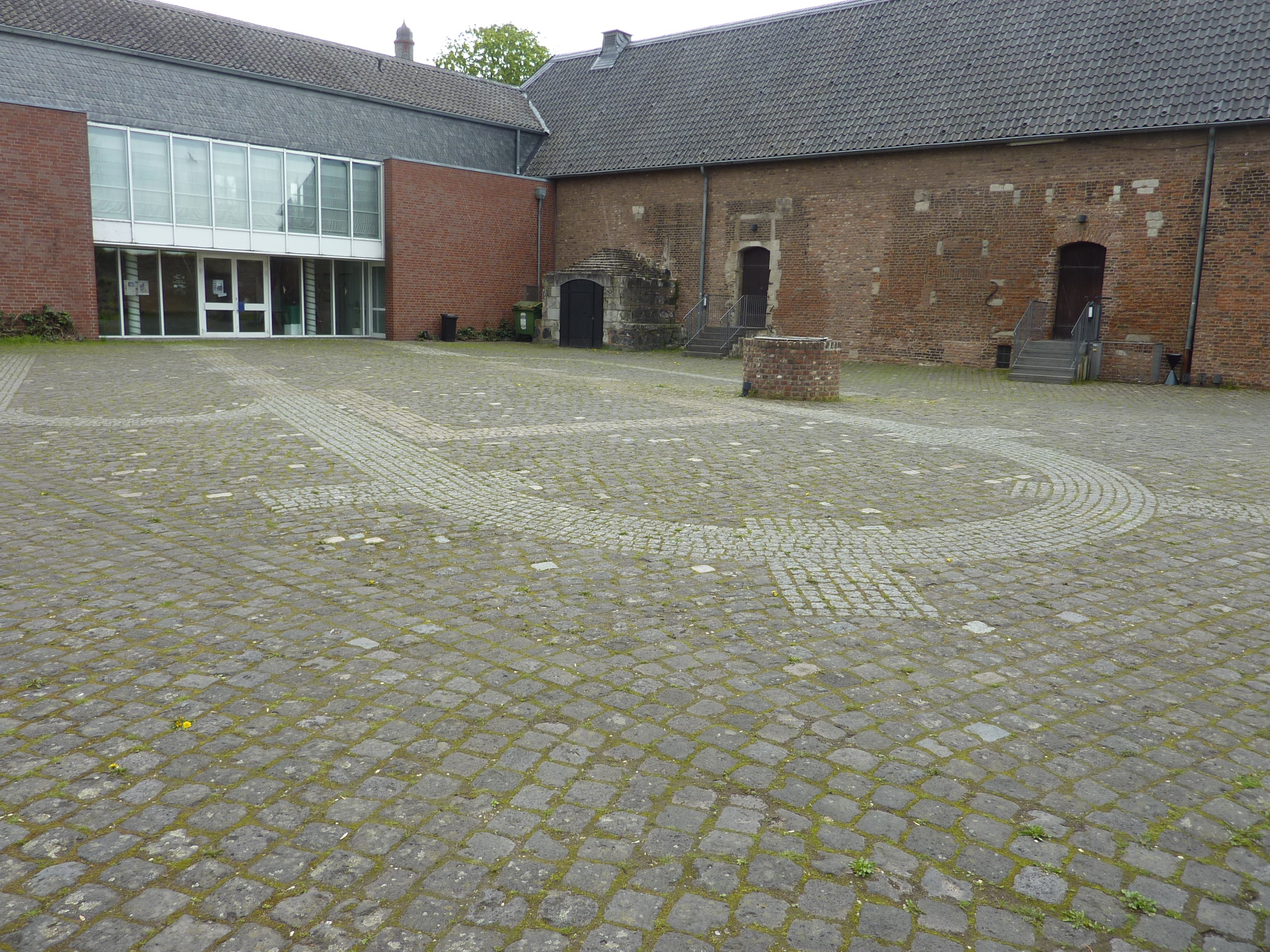 Burg Friedestrom, Markierung Kirchengrundriss